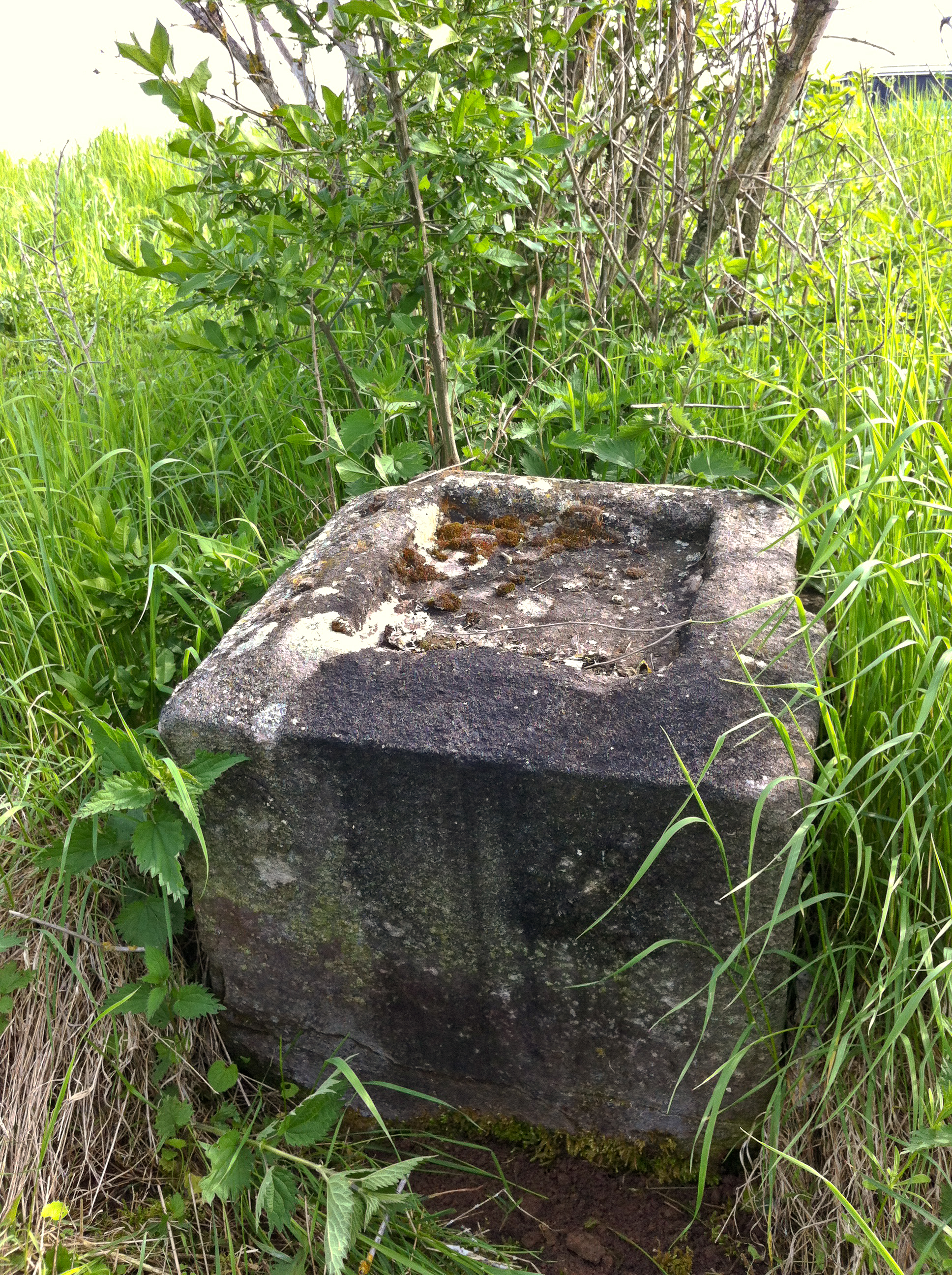 Preußischer Meilenstein (Fragment) bei Beidersee